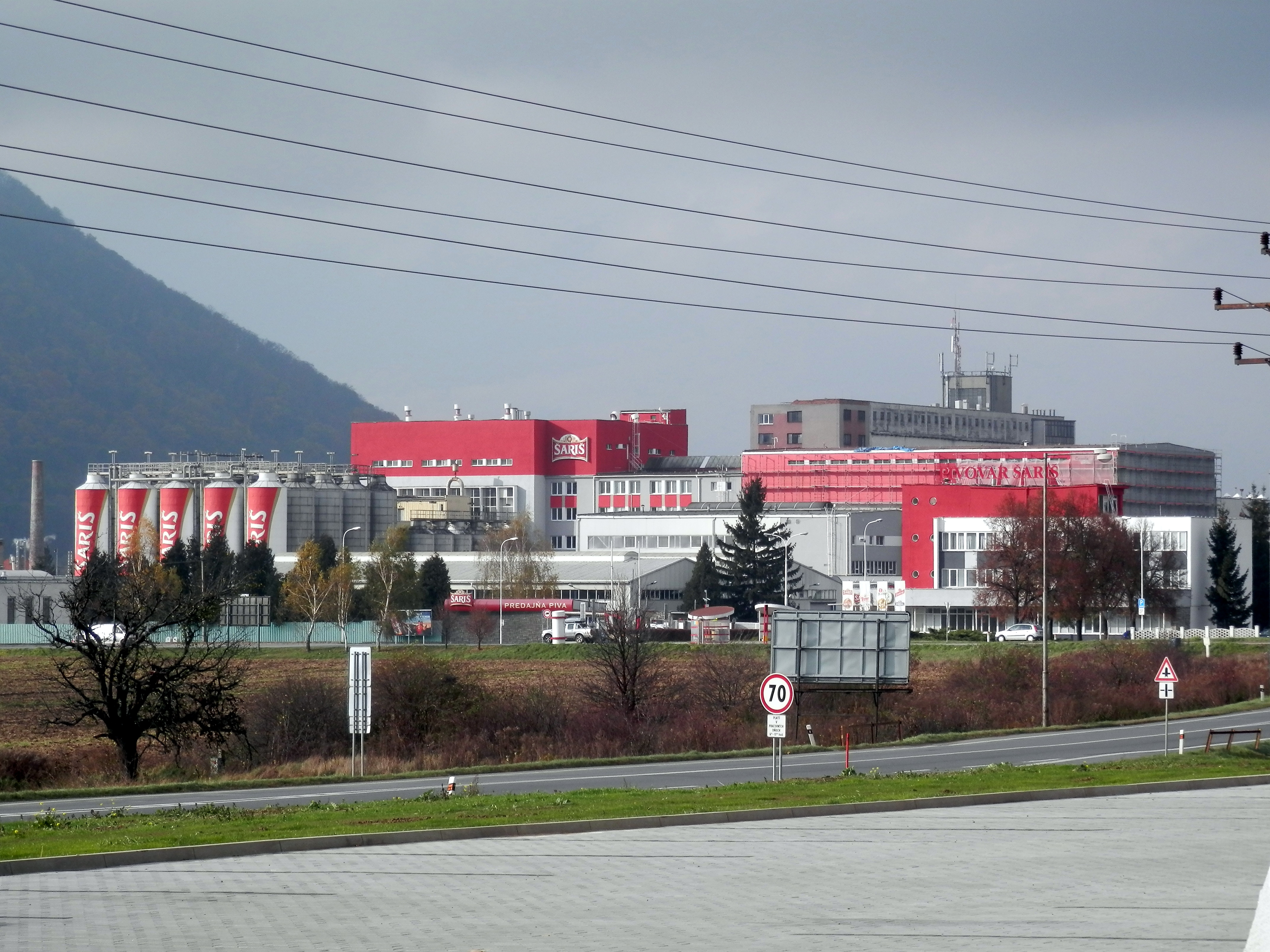 Pivovar v mestečku Veľký Šariš. Okres Prešov.